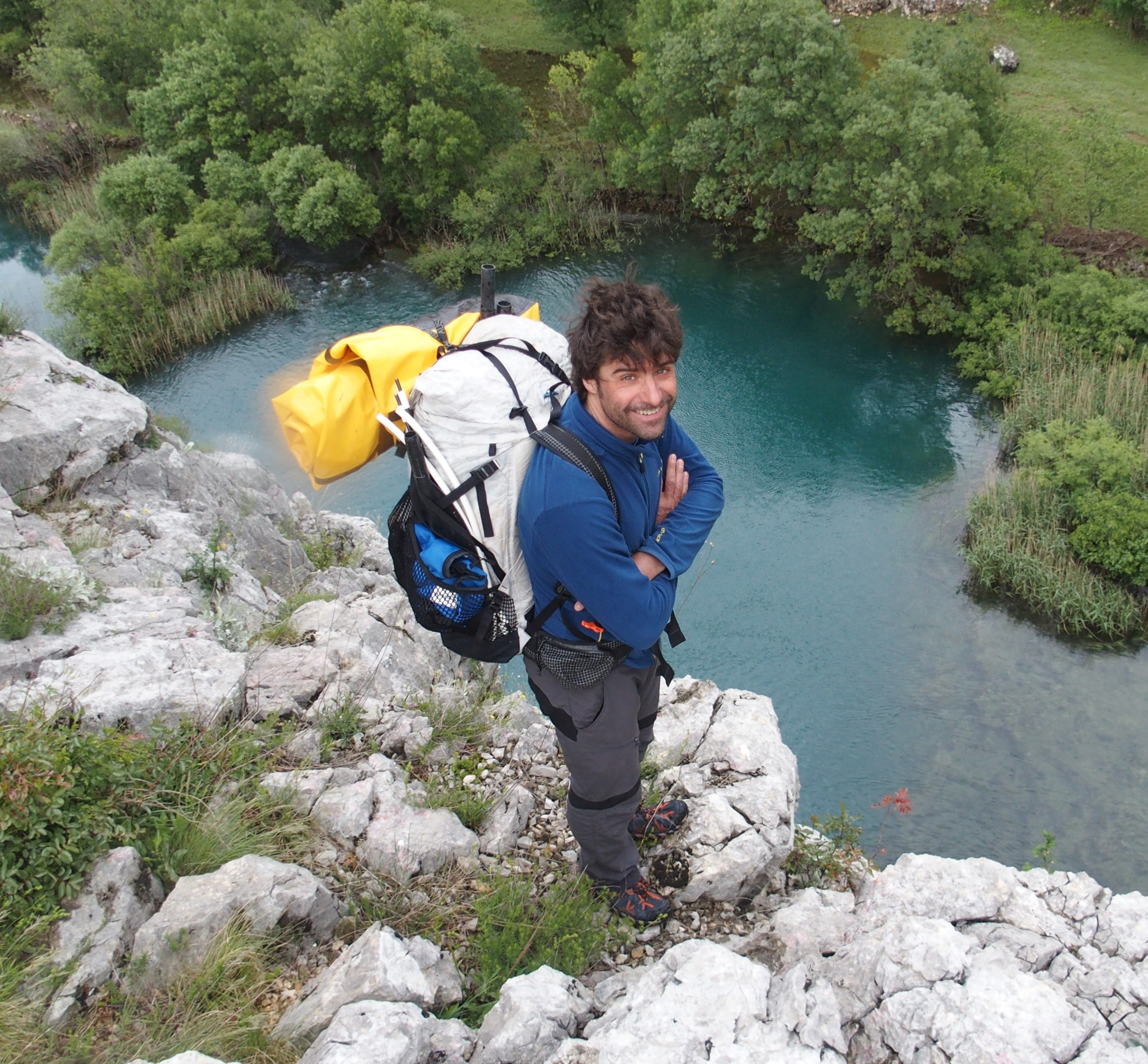 Kombination aus Paddeln und Wandern